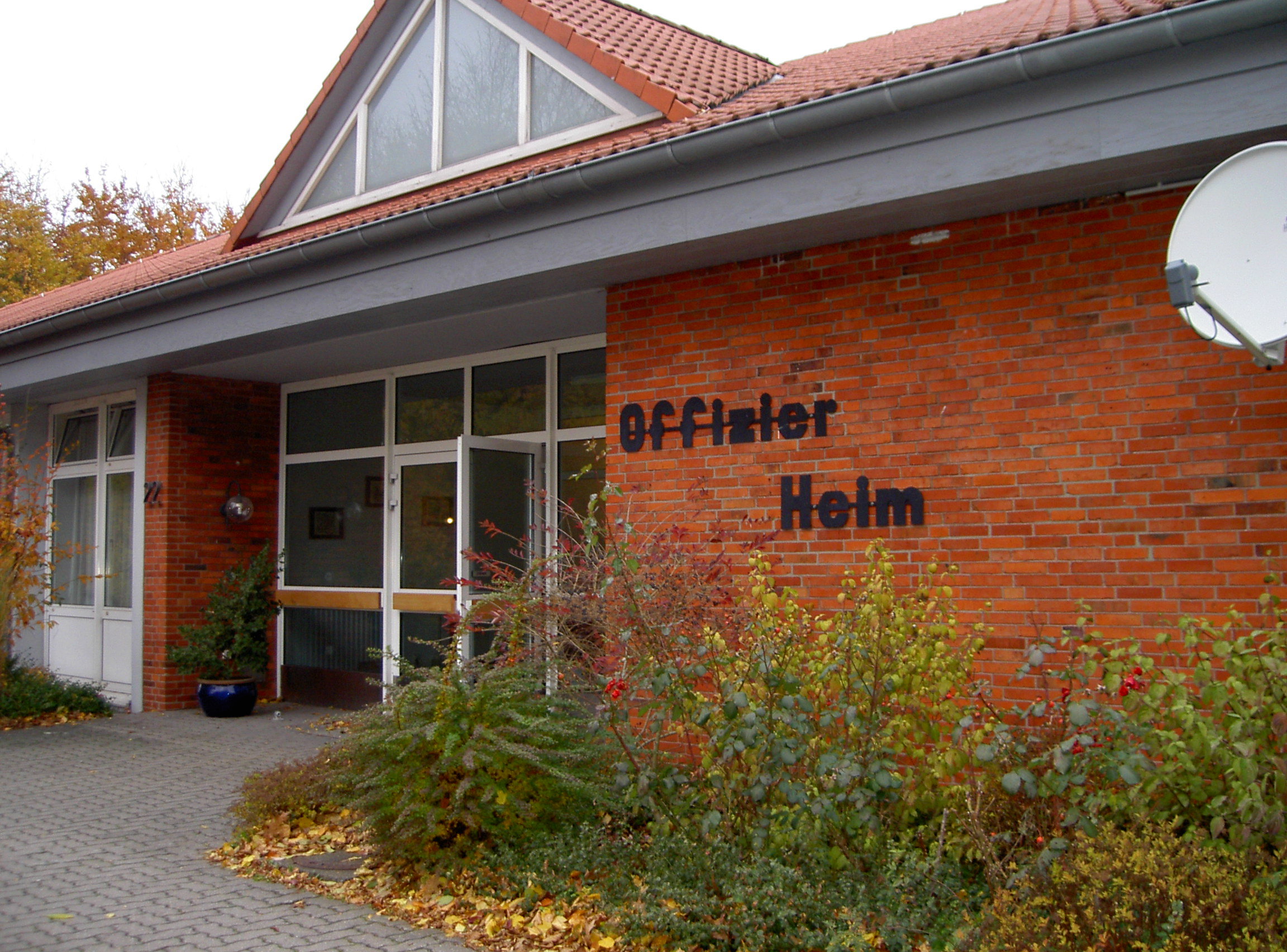 Offizier-Heim der Liliencron-Kaserne in Kellinghusen